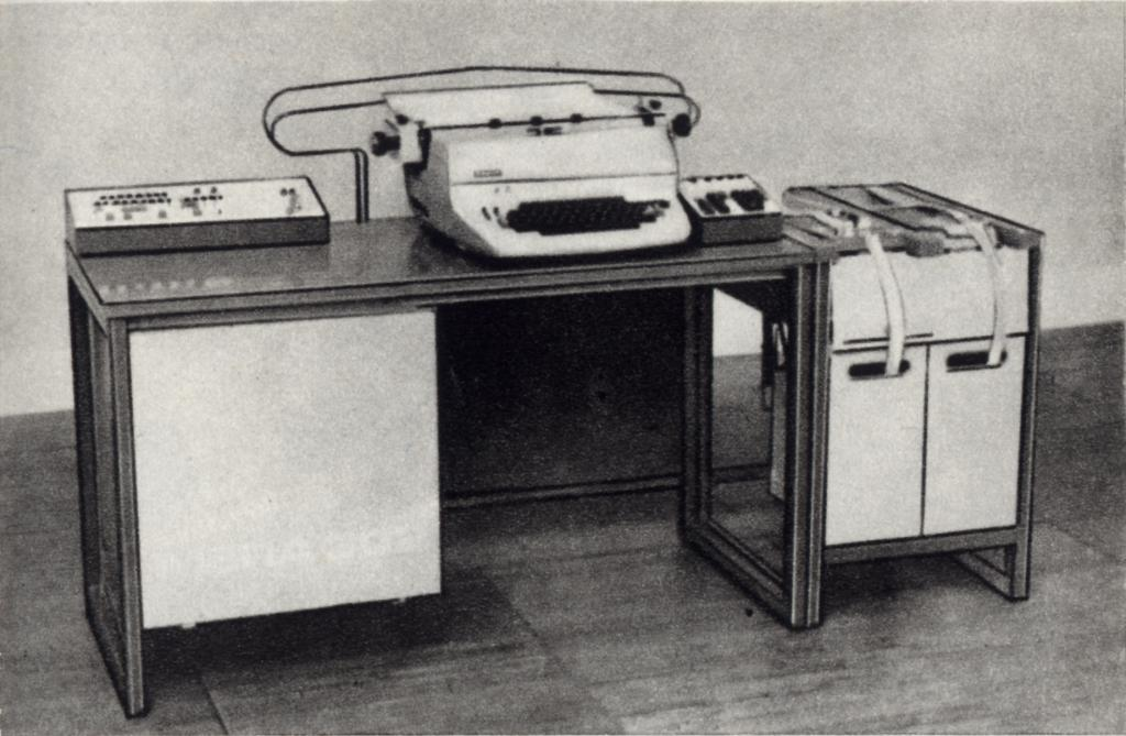 Polski automat obrachunkowy MERA 302. Zdjęcie z "1000 słów o komputerach i informatyce" z 1976 r.